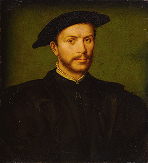 Bärtiger Mann in Schwarz